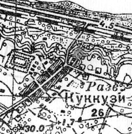 Топографическая карта Ленинградской области, квадрат О-35-12-А-б (Мал. Ижора), деревня Куккузи